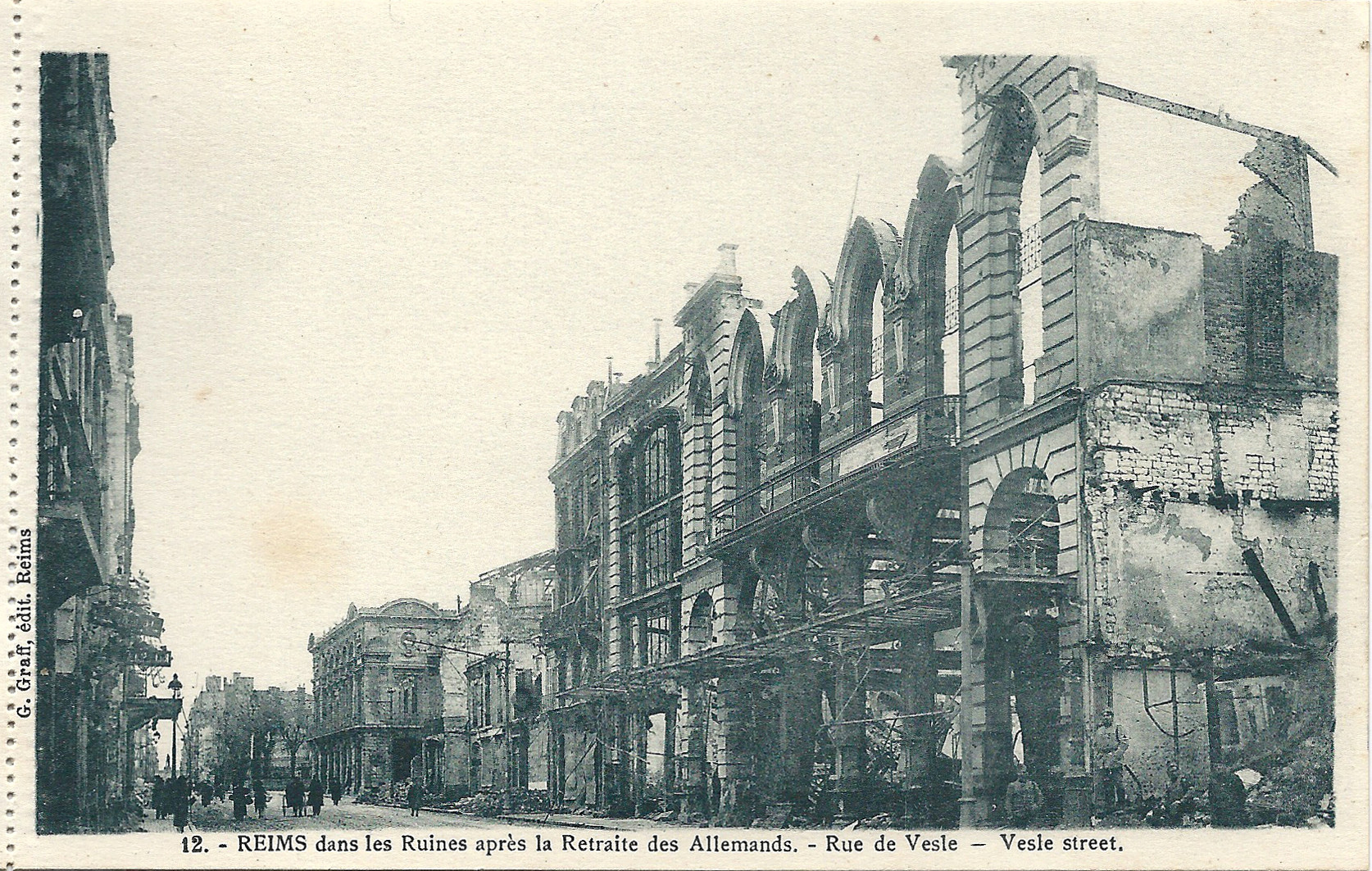 Reims (Marne, France) , carte d'une série comparant Reims avant et après les bombardements de 1914-1918